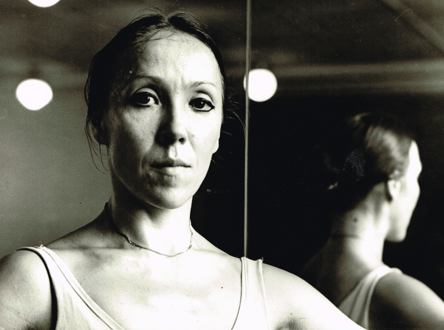 Portrait Ballerina Lydia Wolgina